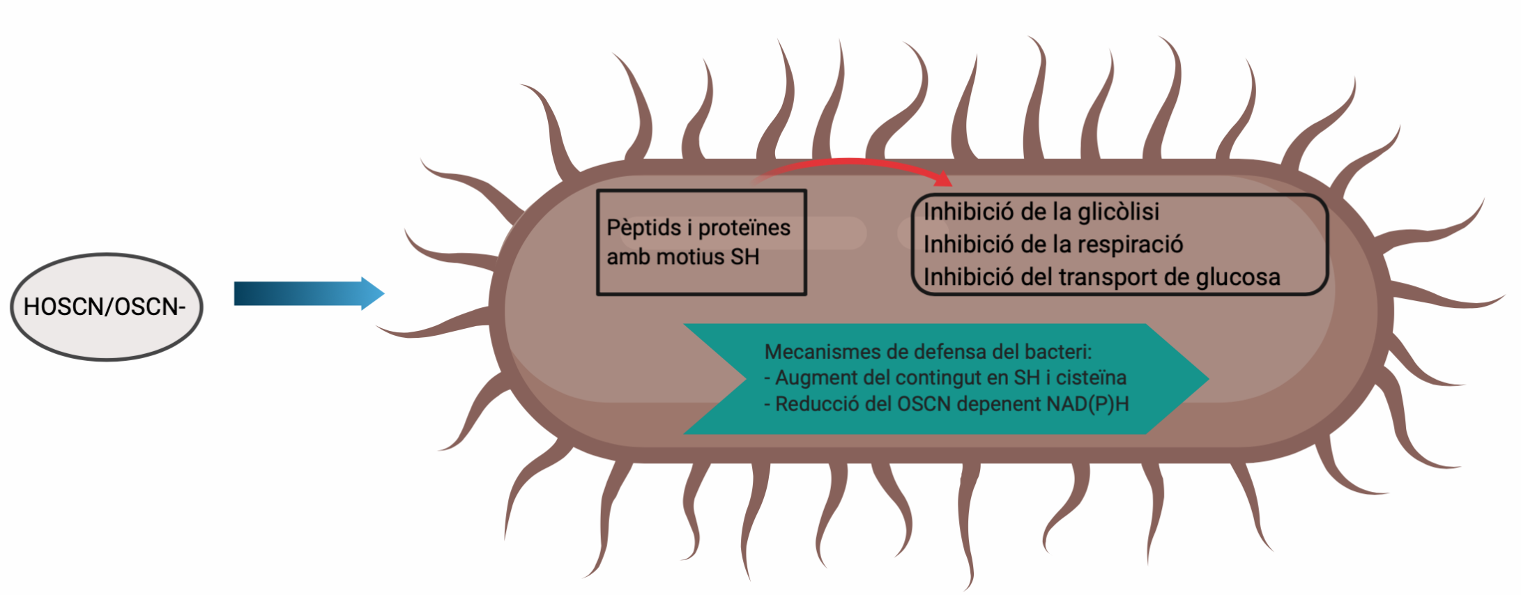 La oxidació de determinats grups de les proteïnes bacterianes per part del hipotiocianat, desencadena tota una serie d'inhibicions amb efectes bactericides.